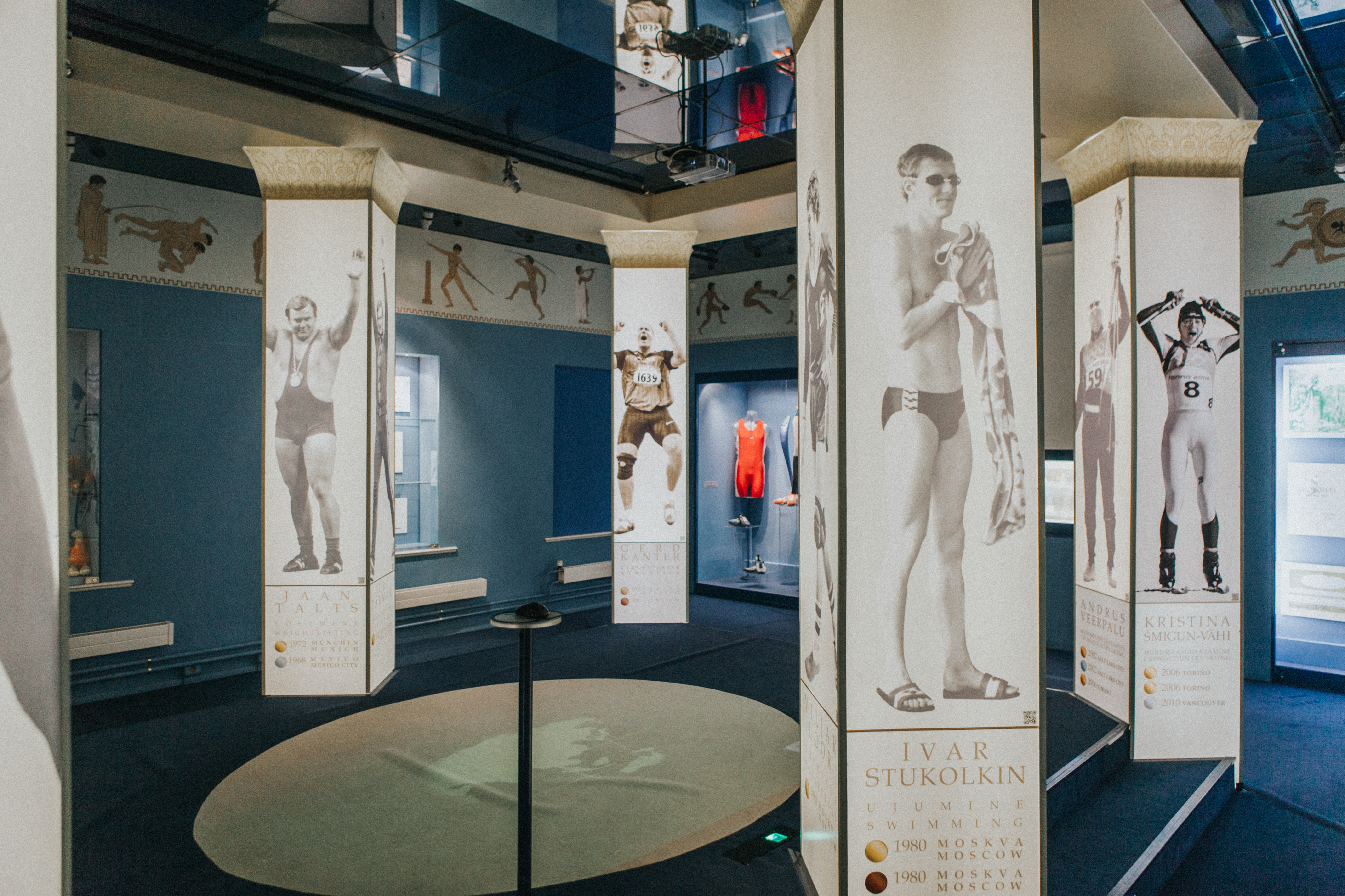 Olümpiaruum